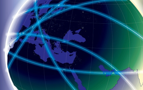 Inimese majandustegevus on piiratud tema tegevusruumiga planeedil Maal.